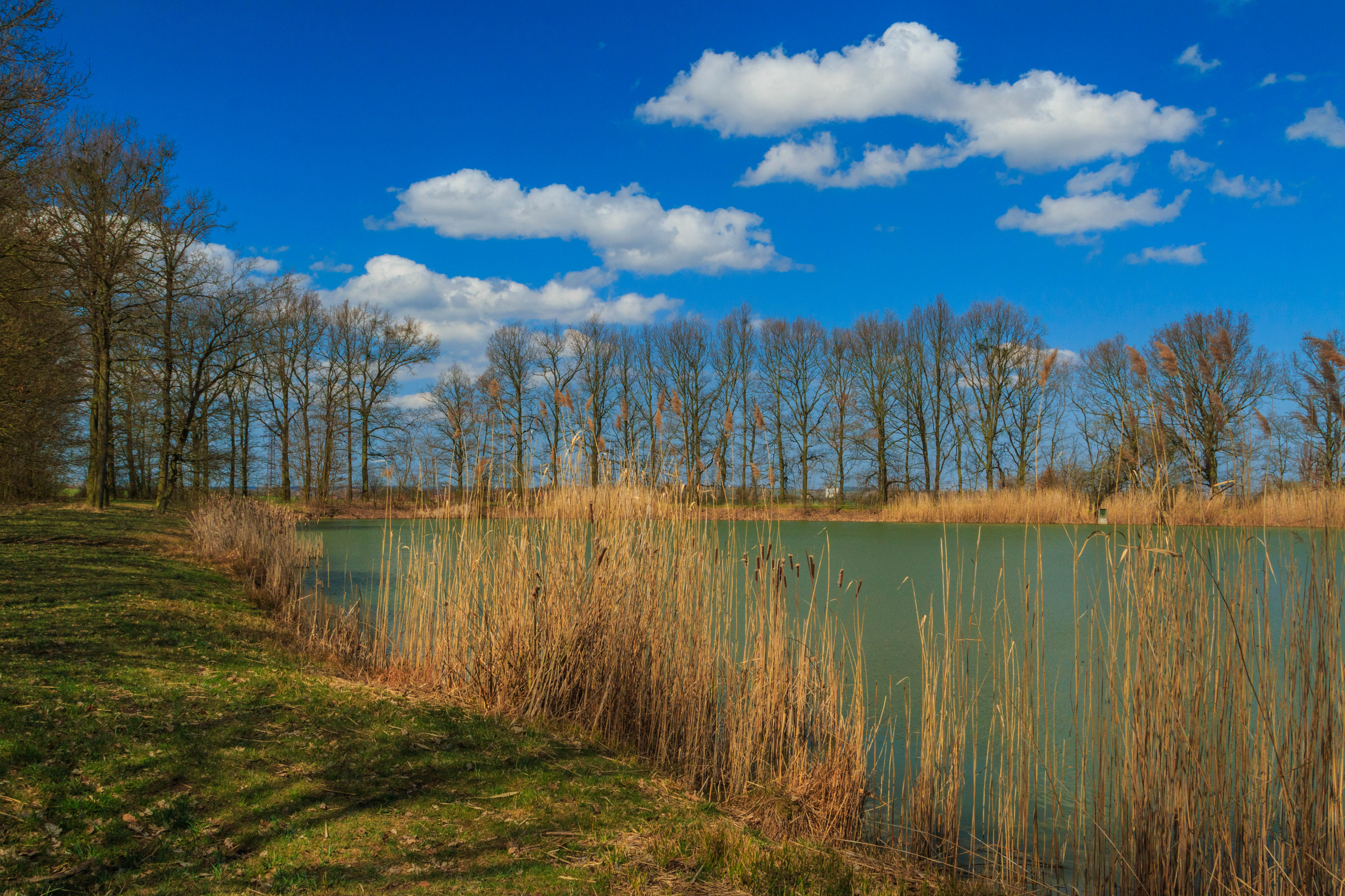 Rybník Konšel pod Měníkem Project: Vodstvo.